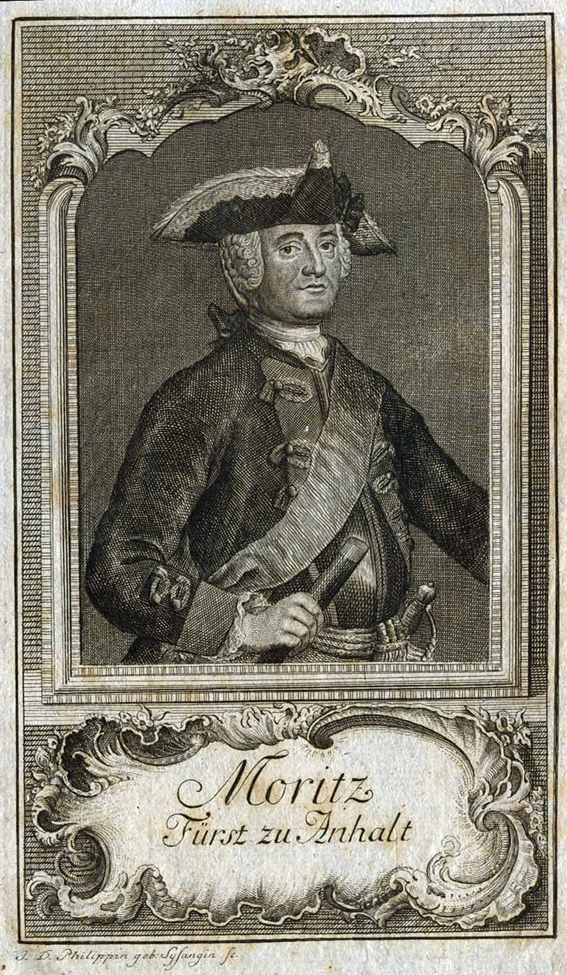 1 grafiskt blad, kopparstickKopparstick föreställande Moritz av Anhalt-Dessau (1712-1760), fältmarskalk.Konstnär: J. D. Philippin